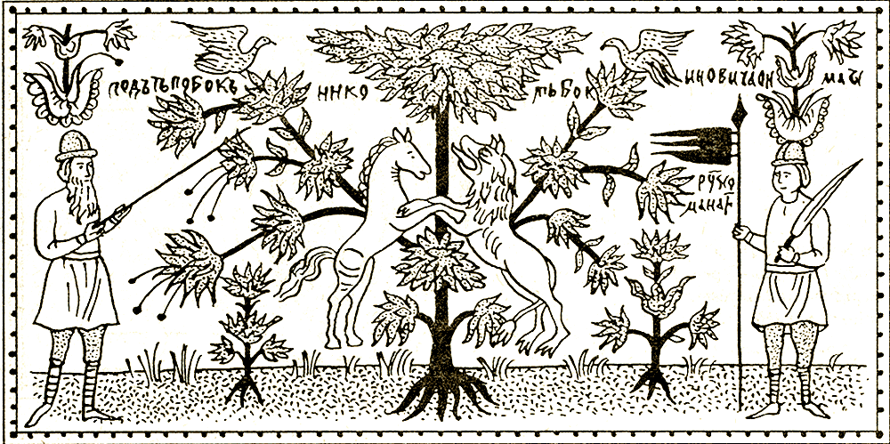 Мировое Древо. Роспись крышки сундука. Северная Двина. Конец 17 в. // Семенова М. «Мы - славяне!» — СПб., 1998. — С. 21.